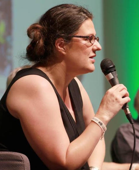 Gwendoline Delbos-Corfield, Journées d'été des écologistes à Dunkerque, août 2017